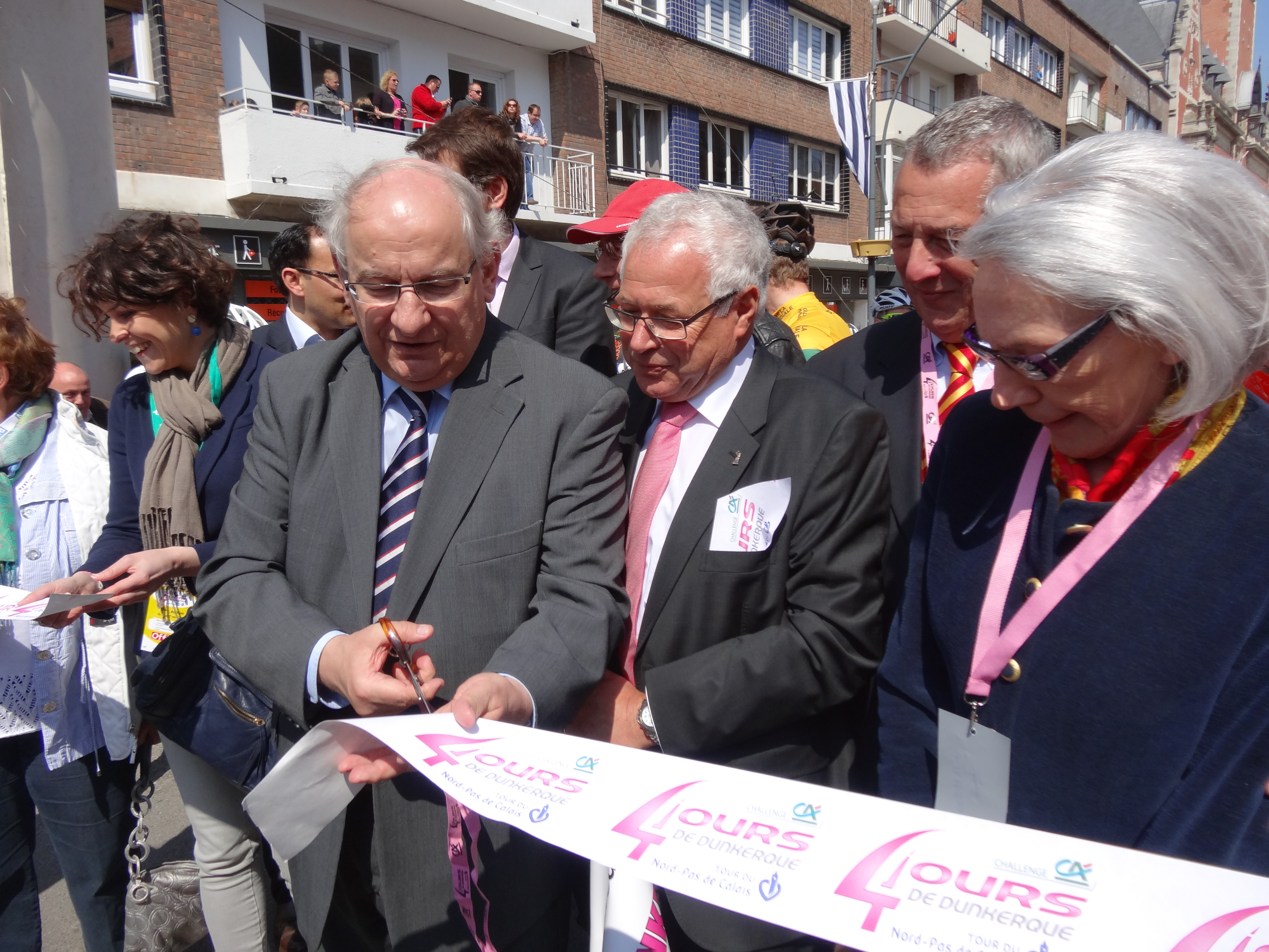 Reportage photographique réalisé le mercredi 1er mai 2013 au départ de la première étape de l'édition 2013 du Quatre jours de Dunkerque à Dunkerque, Nord, Nord-Pas-de-Calais, France. Le dossier photographique montre des véhicules de course exposés, la caravane publicitaire, la présentation des coureurs, et le départ. Ce fichier représente un ou plusieurs coureurs cyclistes que JÄNNICK Jérémy n'est pas parvenu à identifier, ou n'a pas eu le temps de le faire. Si vous le reconnaissez, supprimez Quatre jours de Dunkerque 2013|Cycliste non identifié et remplacez le par Depicted person|1= :Category: | et placez Category: en bas de page. Si vous souhaitez qu'un portrait soit généré à partir de cette image, contactez son auteur qui s'en chargera, afin que ce nouveau fichier soit cohérent avec les autres réalisés. Des notes peuvent être utiles pour identifier précisément chaque personne.